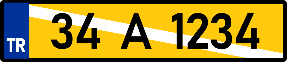 نمونه پلاک ترکیه